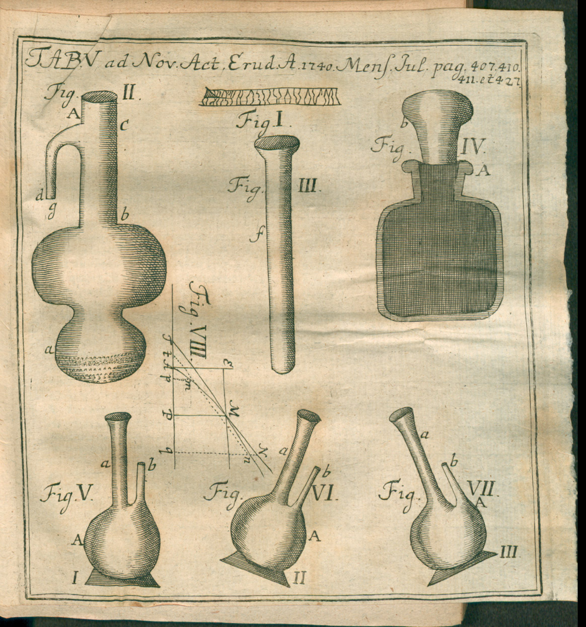 Illustration